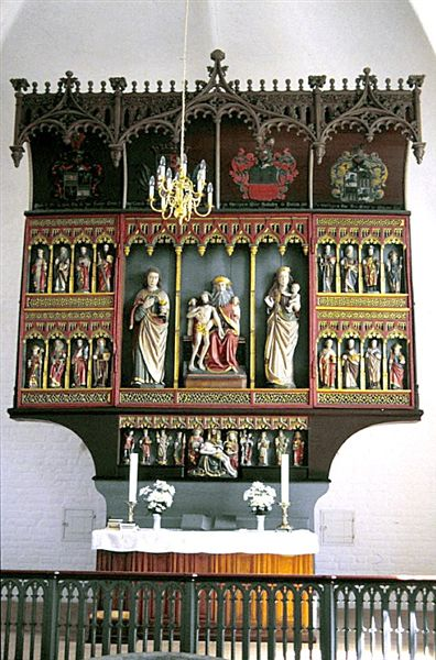 Altertavlen da: Tvilum Kirke